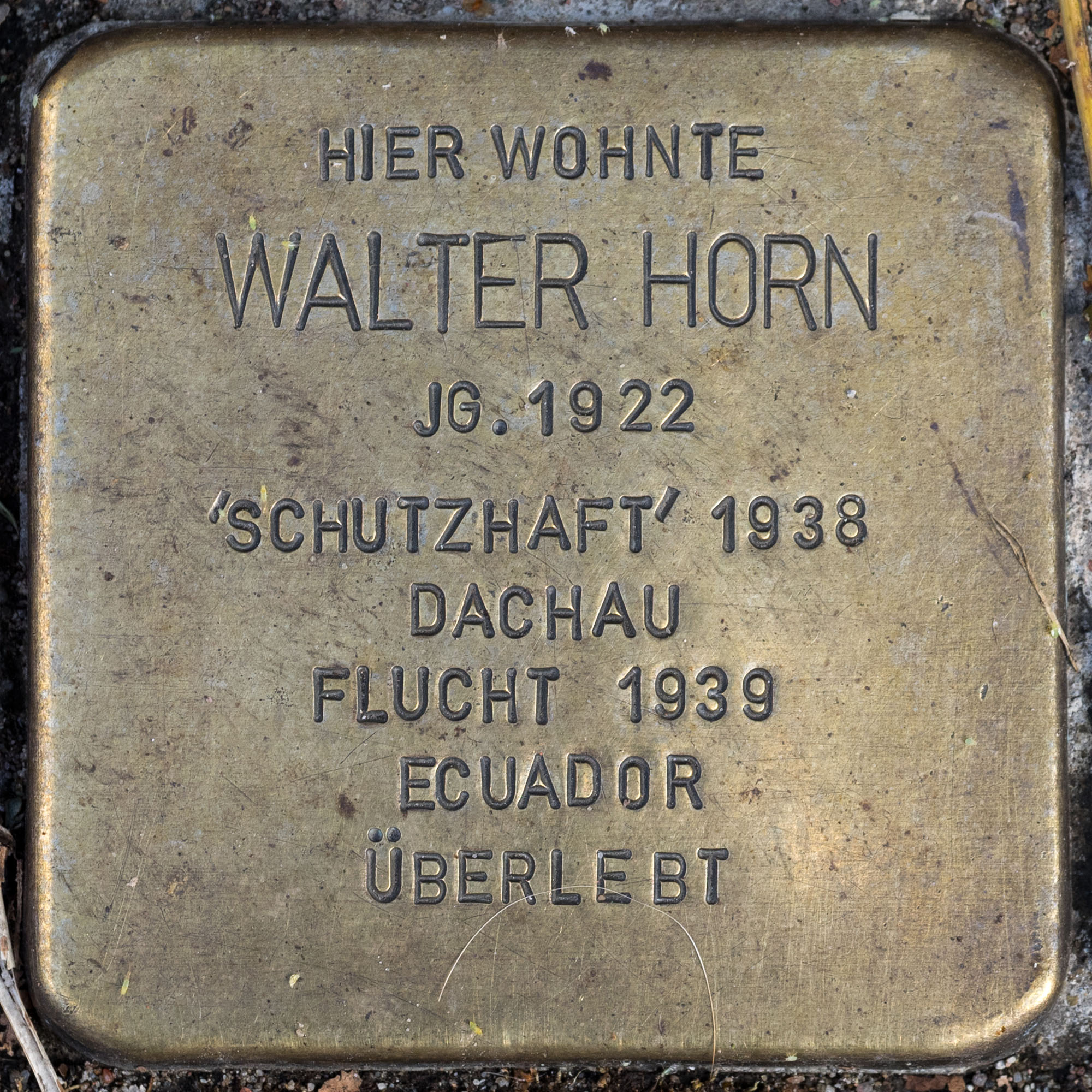 2016 Stolpersteine ToeVo Horn Walter